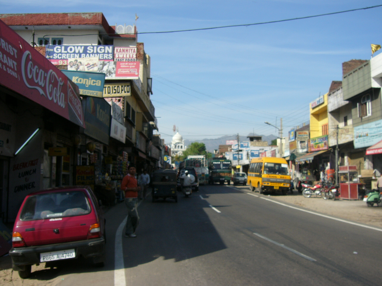 Pinjore Garden Chandigarh India